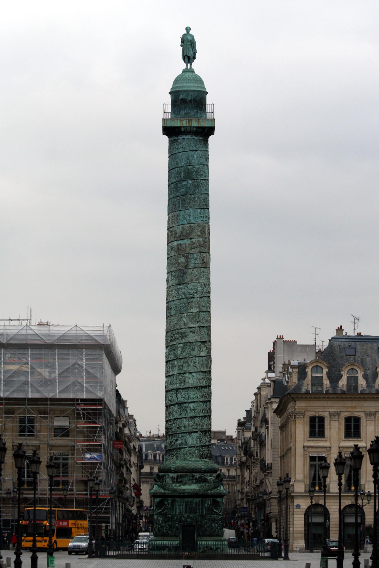 Colonne Vendôme